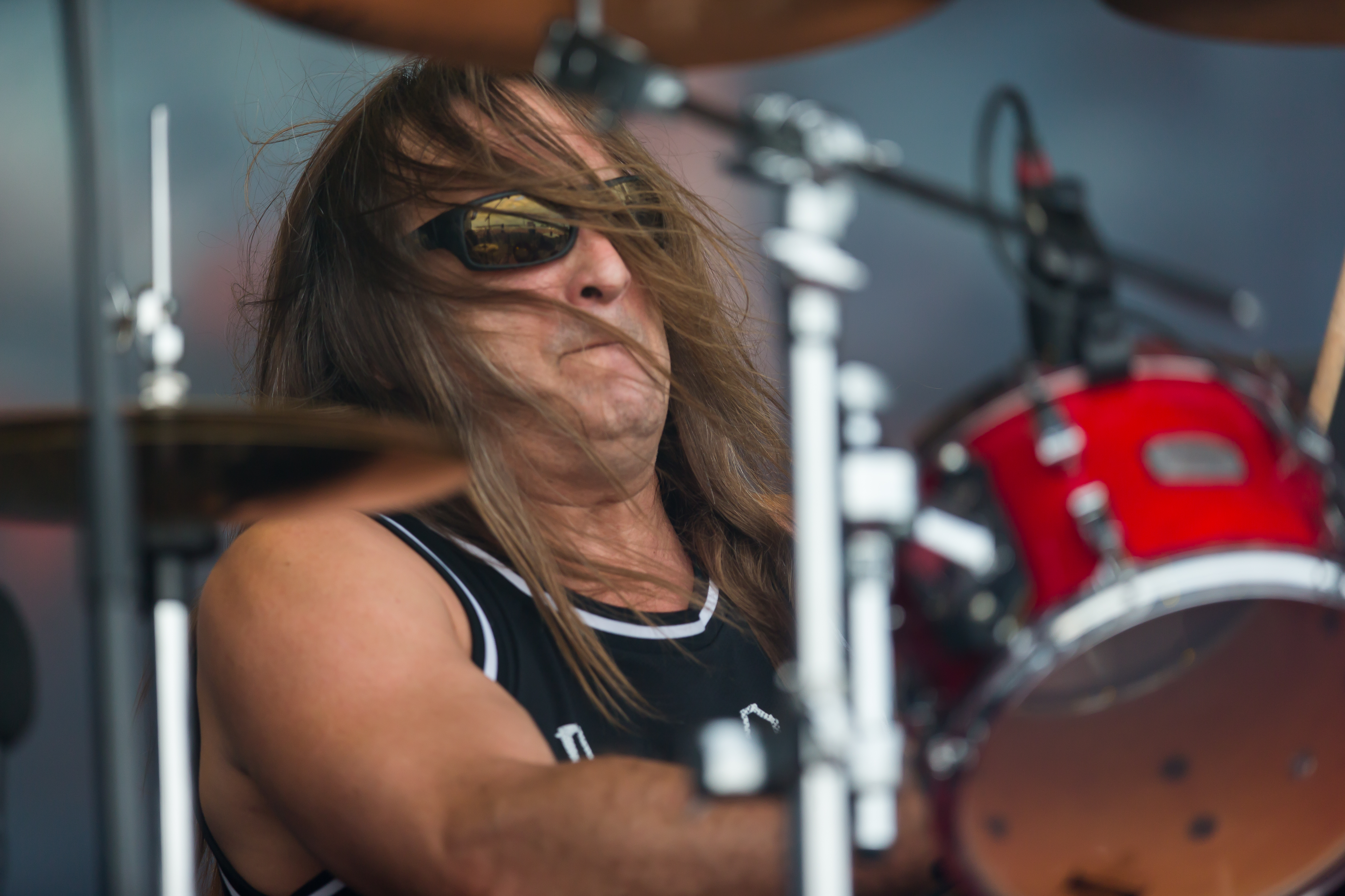 Exodus during Summer Breeze 2016 at , Dinkelsbühl, Bayern, Germany on 2016-08-18, Photo: Sven Mandel